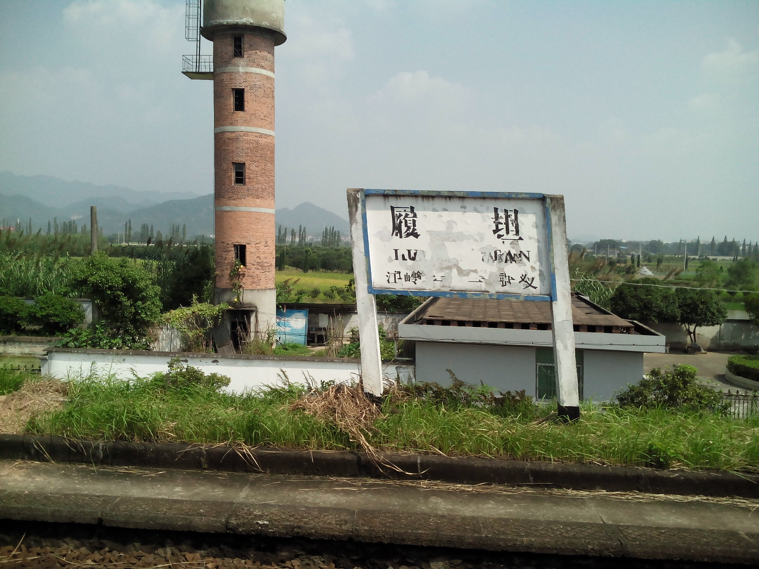 201410履坦站站牌2